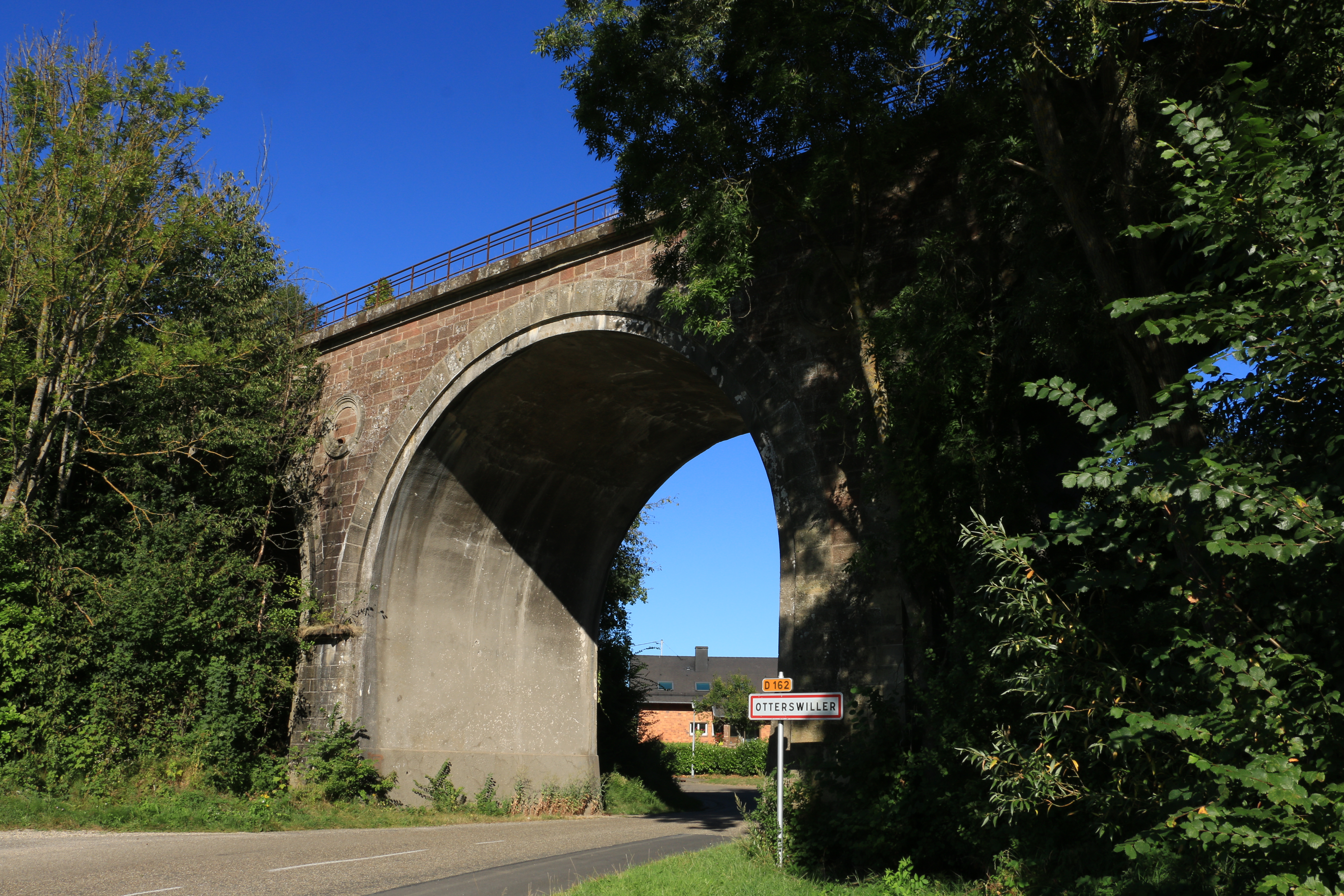 Viaduc d'Otterswiller de 1864 Ancienne voie ferrée Saverne-Molsheim 16 arches. 17 mètres de haut, 215 mètres de long.